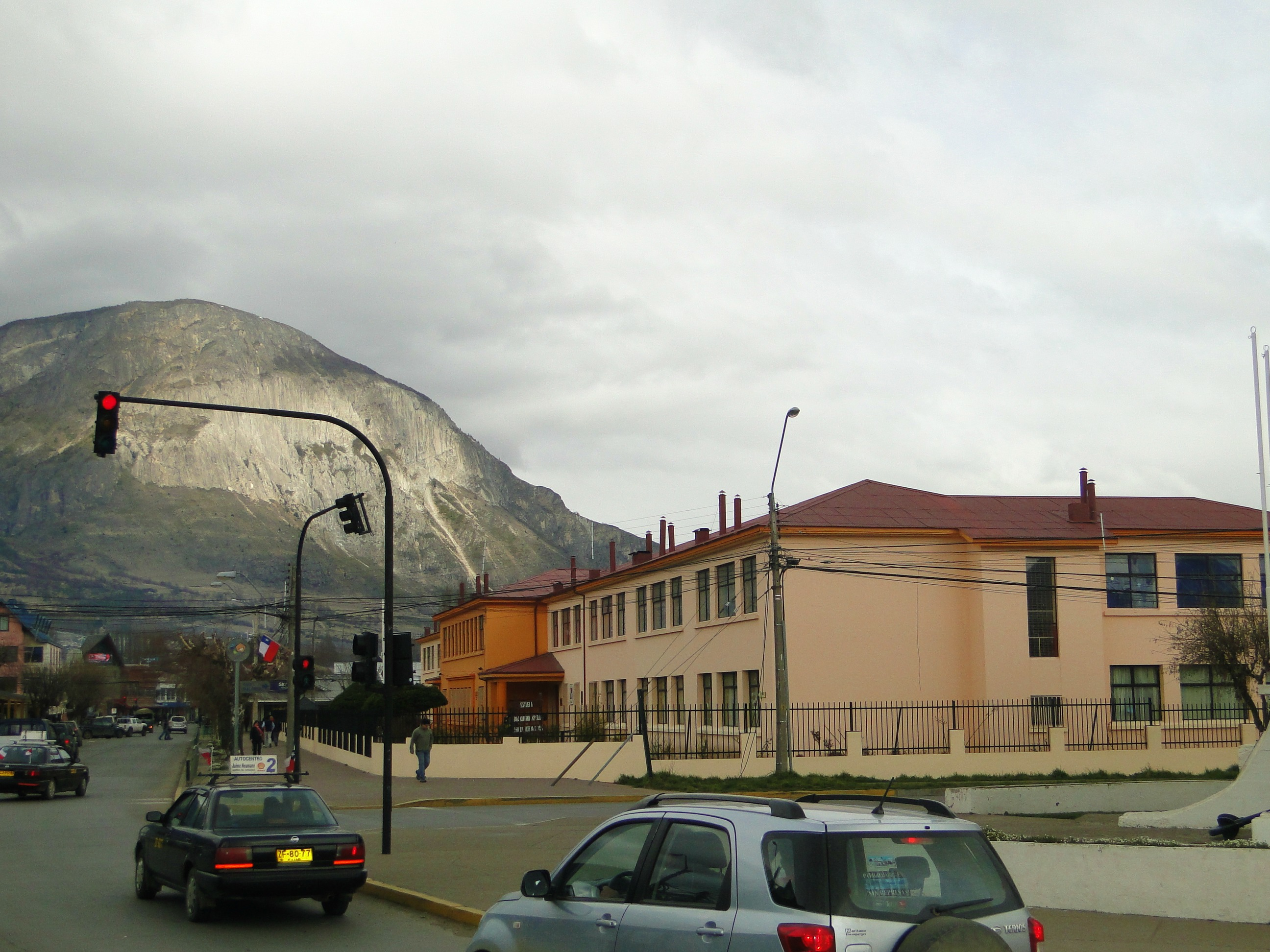 Escuela Pedro Quintana Mansilla This is a photo of a national monument in Chile: 1860